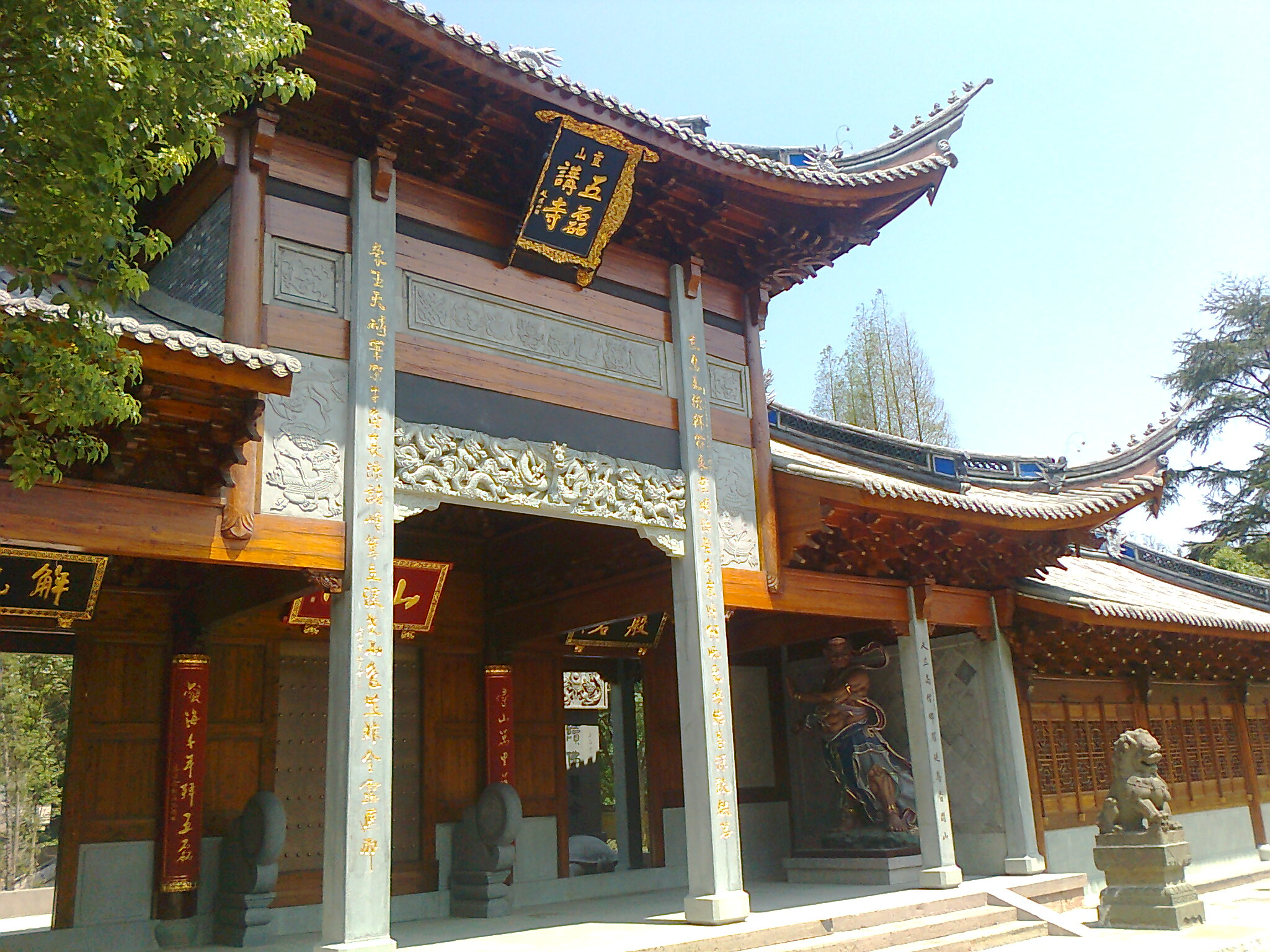 中文（中国大陆）: 五磊讲寺正门